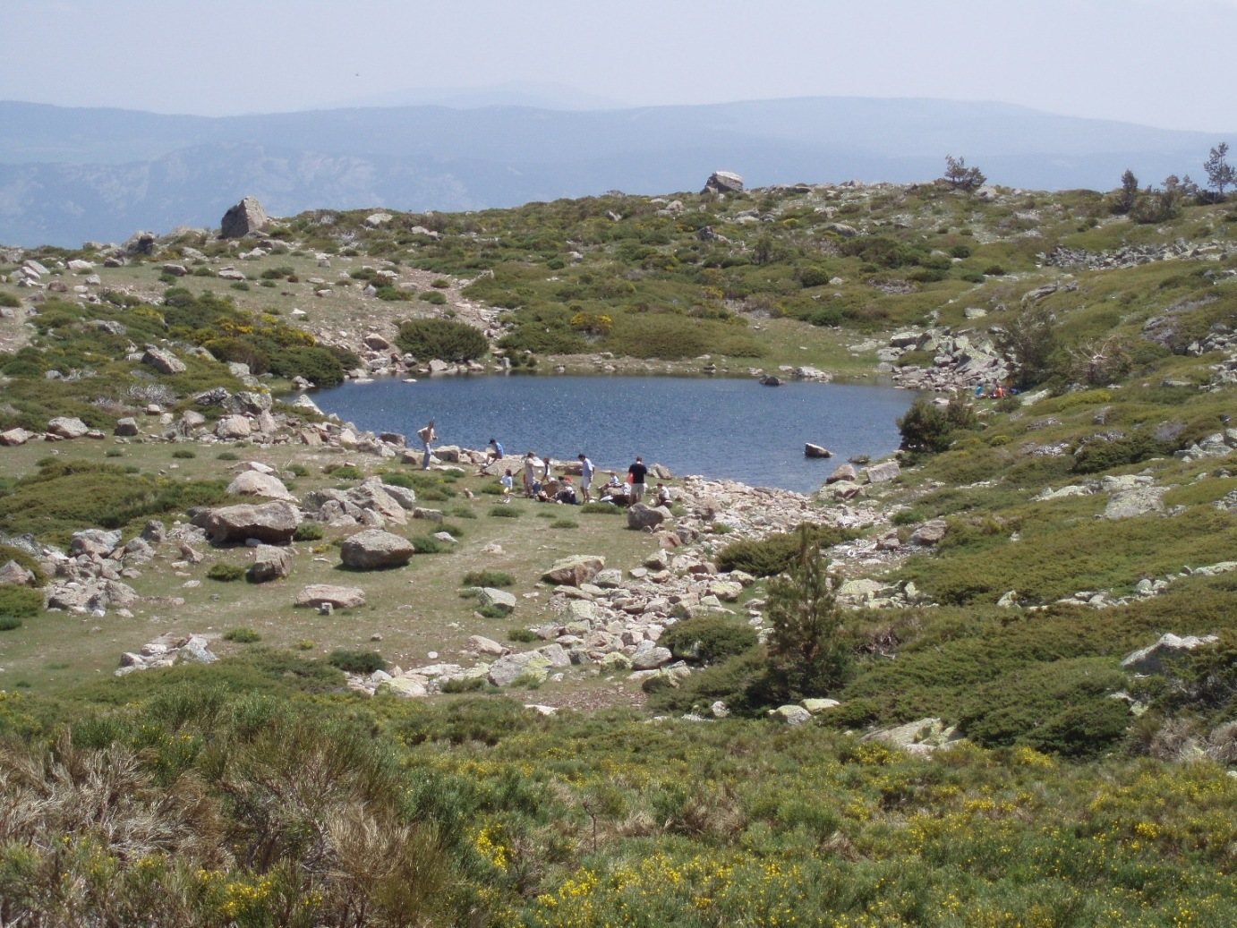 Laguna chica de Peñalara, ubicado en la Comunidad de Madrid (España).